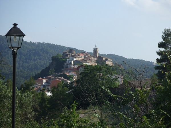 Santa María d'Oló, pueblo de la comarca del Bages